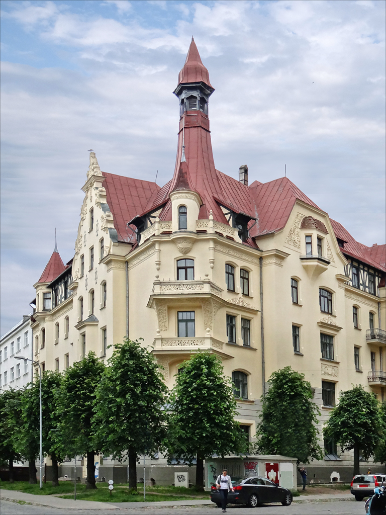 Immeuble art nouveau (jugendstil) situé au n°12 de la rue Alberta (Alberta Iela) à Riga en Lettonie. Il est classé par les historiens d'art dans l'art nouveau de tendance romantisme national, un mouvement intellectuel visant à affirmer la culture et les traditions de la Lettonie face à l'impérialisme russe. Architectes : Konstantins Pekshens (K. Peksens : 1859-1928) et Eijens Laube (1880-1967) Cet immeuble érigé en 1903 était en son temps un des bâtiments les plus modernes de Riga, avec le chauffage central et l'adduction d'eau chaude. Son escalier à vis est célèbre. La façade de l'immeuble est ornée de motifs stylisés représentant des plantes et des animaux de Lettonie. L'un des deux architectes K. Pekshens y habitait, un musée d'art nouveau a été installé dans ce qui fut son appartement au rez-de-chaussée. site du musée _________ Riga, capitale de la Lettonie, est un parfait exemple de ville Art Nouveau. Son centre abrite la plus belle concentration de bâtiments Art nouveau au monde: plus d'un tiers d'entre eux appartiennent en effet à ce style. Cet ensemble architectural est inscrit sur la liste du Patrimoine mondial.... Extrait du site du réseau des villes art nouveau